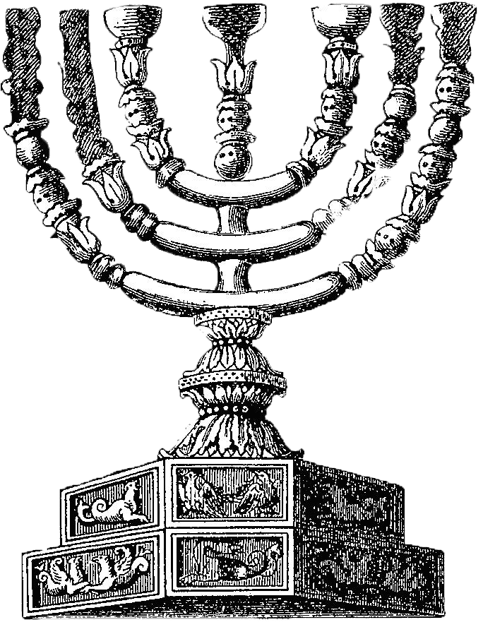 Менора на арке Тита в Риме